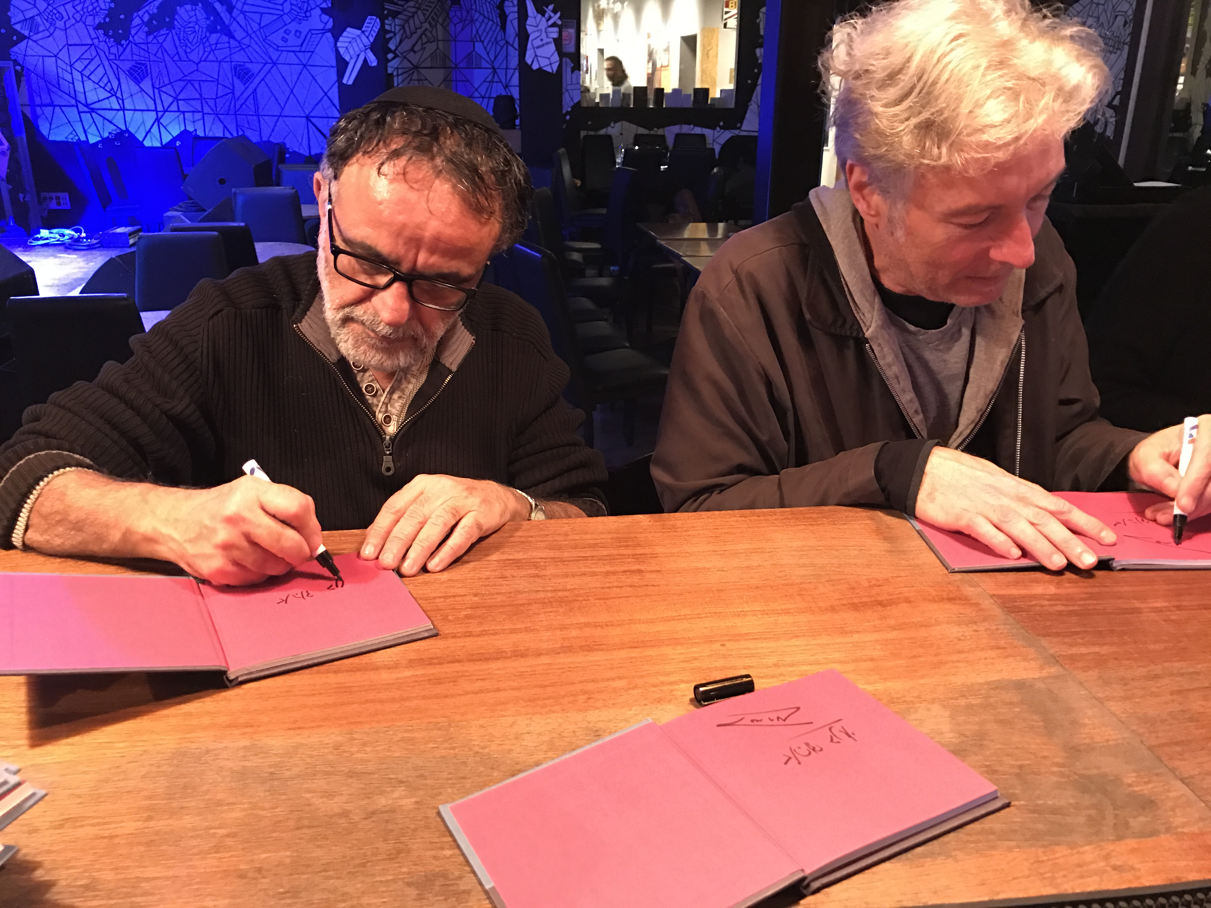 אהוד בנאי (משמאל) וברי סחרוף חותמים על אלבומם המשותף "היא הופיעה כמו הרוח" שיצא בינואר 2017